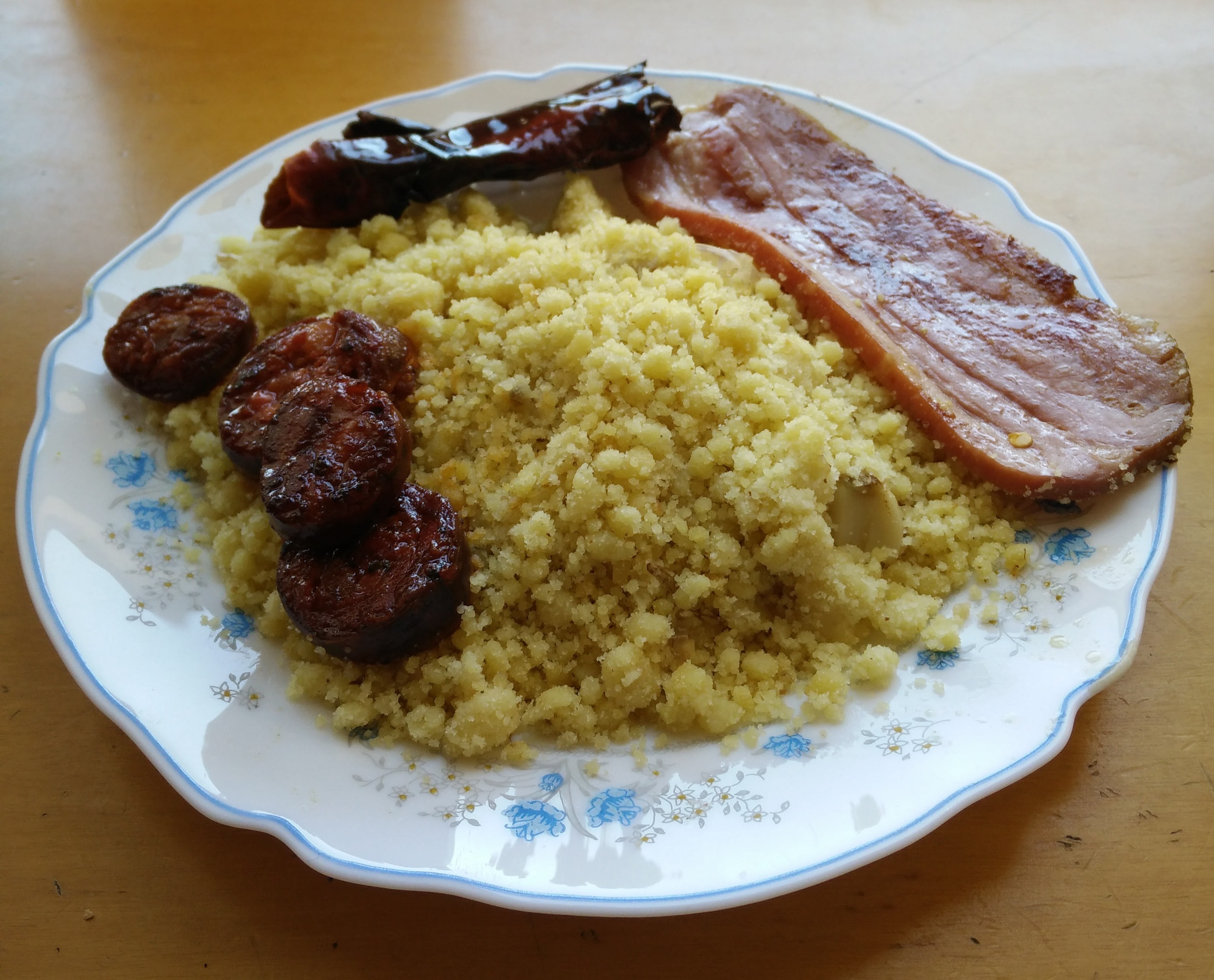 migas de Almería, hechas con sémola